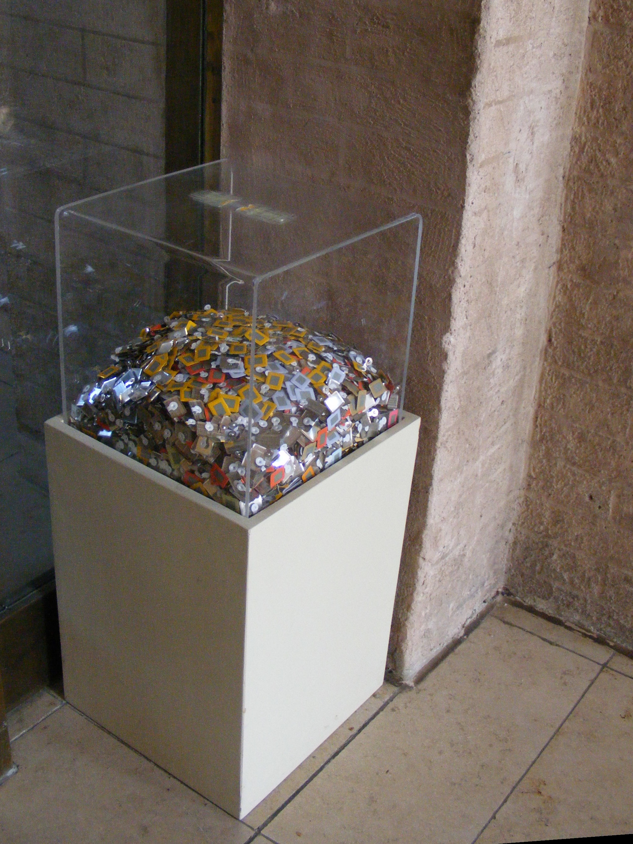 Alte Pinakothek - Foyer: Aufbewahrungsbehälter für benutzte Anstecker (Erkennungszeichen für das Aufsichtspersonal, dass ein Besucher das Eintrittsgeld gezahlt hat).